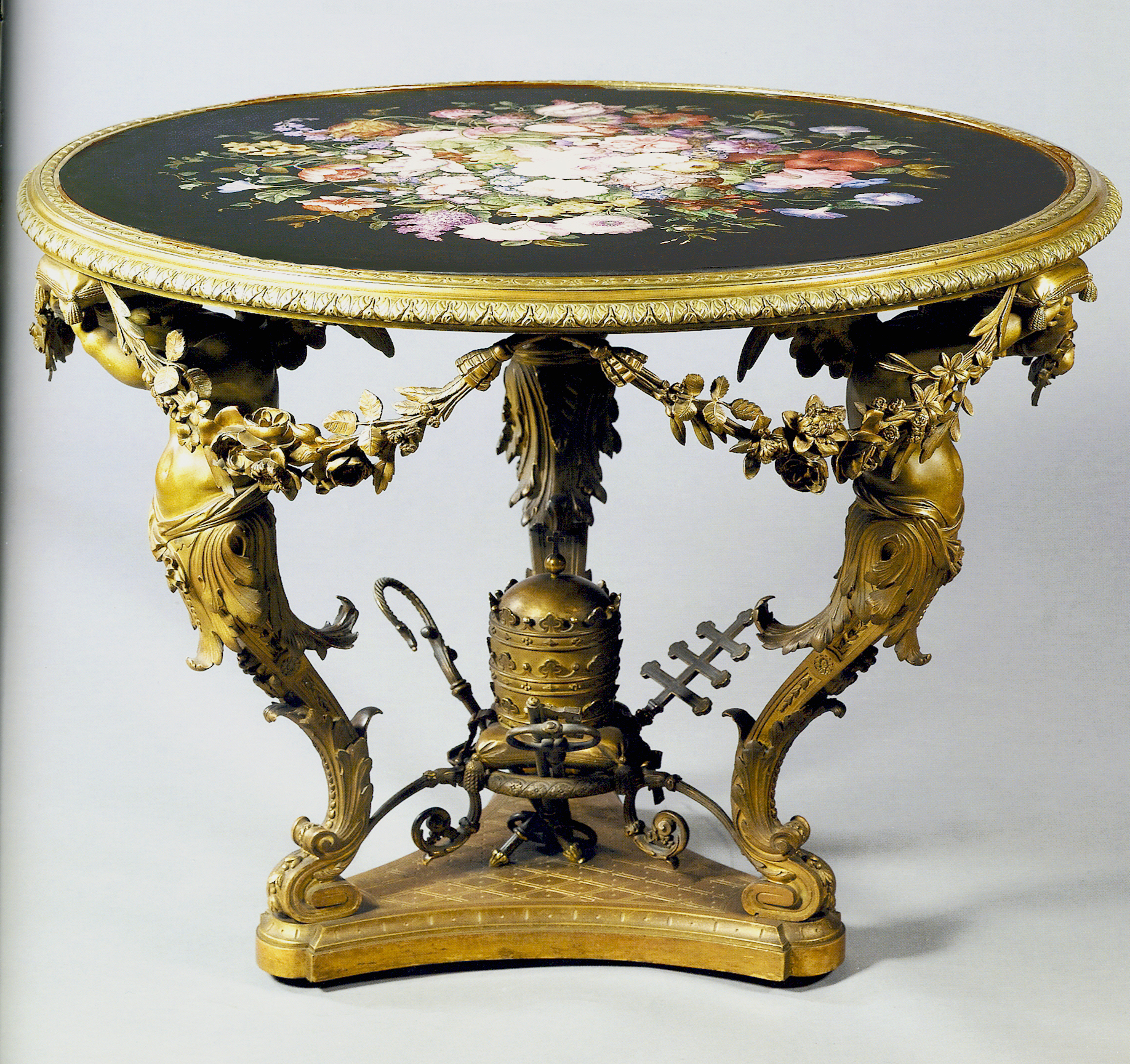 Diesen vergoldeten Bronzetisch mit Micromosaik aus der Werkstätte des Vatikan schenkte Pius IX. dem König Georg V. Er stand bis zum September 2005 in den Schauräumen von Schloss Marienburg. Dann wurde er bei Sotheby’s versteigert.